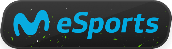 Logotipo de Movistar eSports